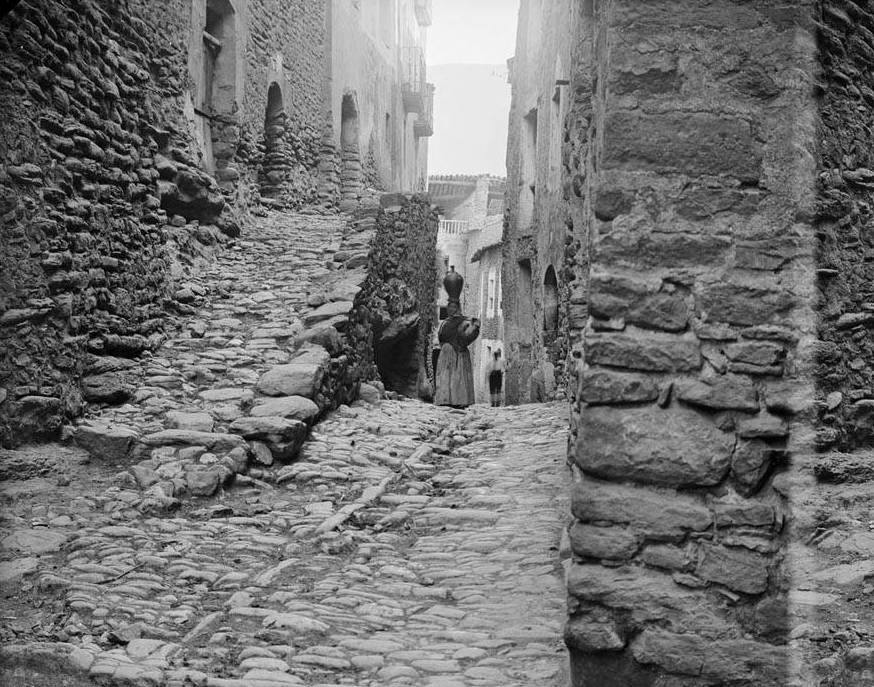 Imatge